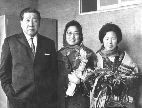 1963년 2월 풍문여고 졸업식 부친 김두한 전의원, 모친 이재희